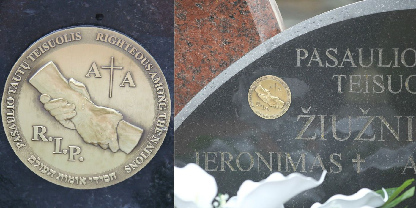 Medalis, ženklinantis Pasaulio tautų teisuolio kapą